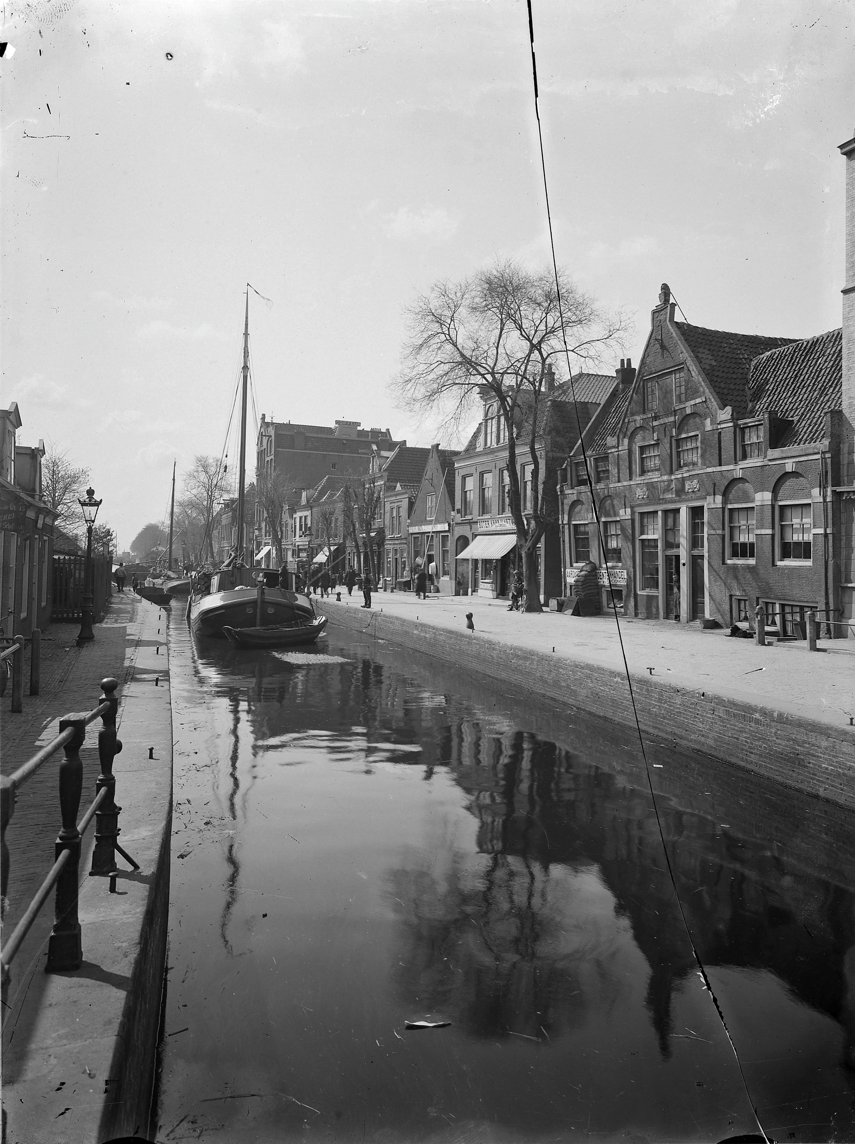 Aalsmeerder Veerhuis: Gezicht op de Sloterkade met het Aalsmeers Veerhuis